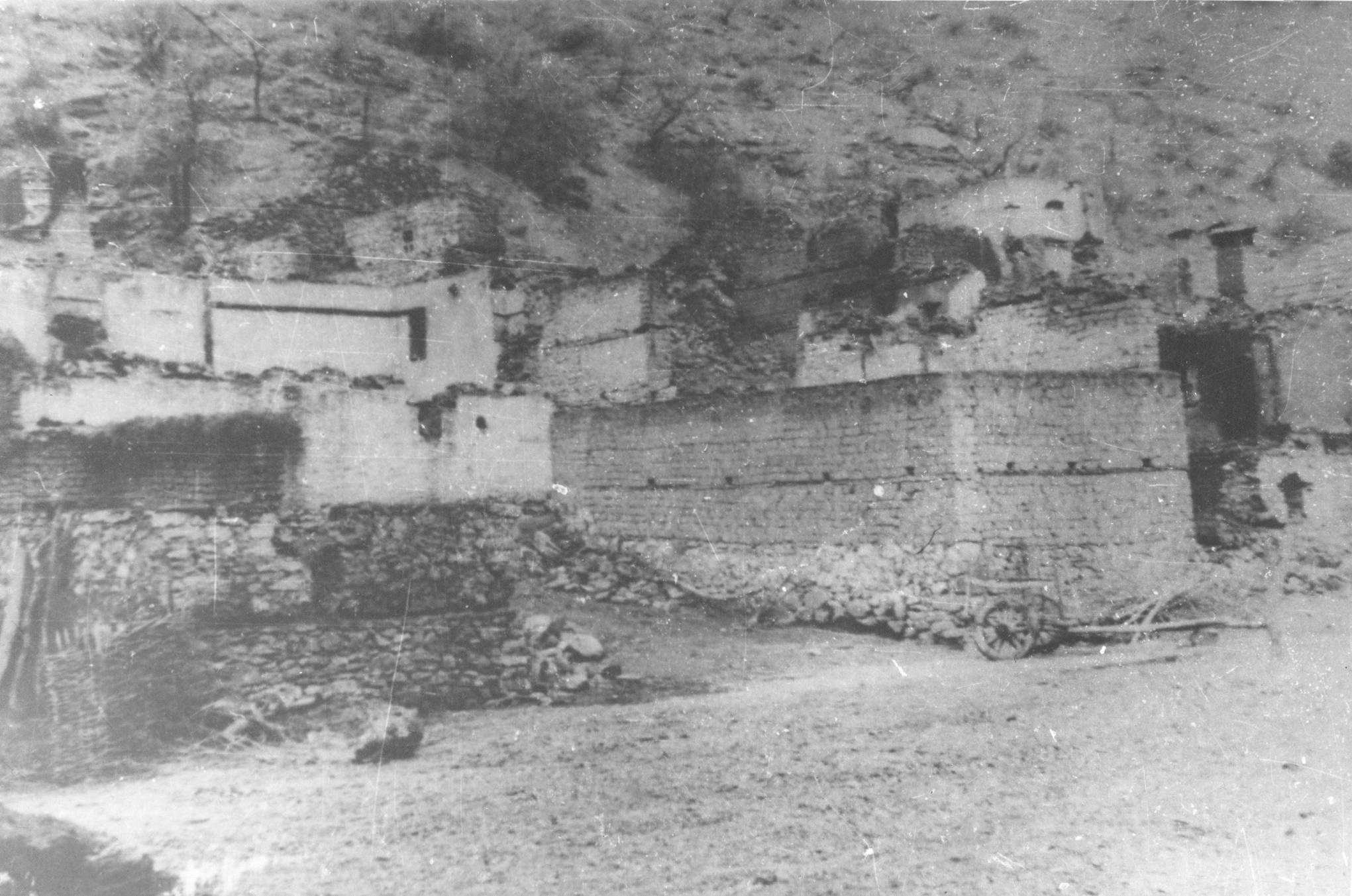 Селото Мраморец во Западна Македонија запалено од балистите